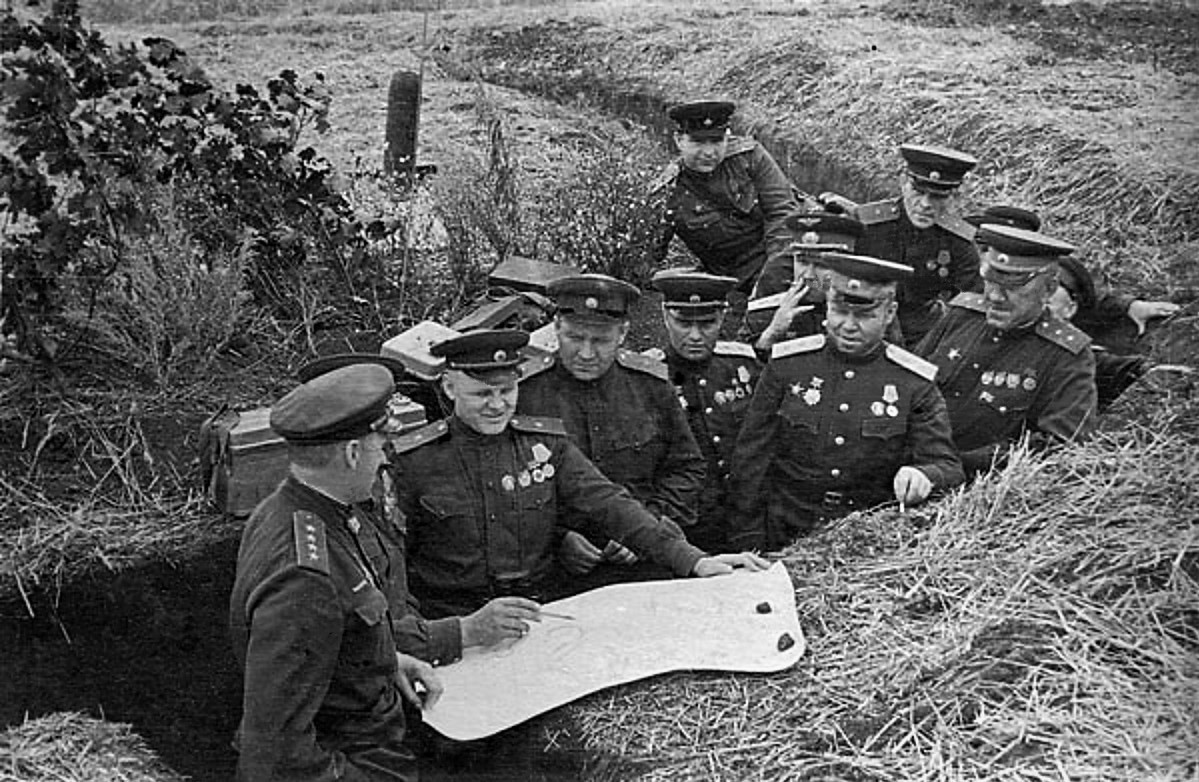 Командование Центрального фронта перед Курской битвой. Район станции Поныри. Слева направо: командующий фронтом генерал армии К.К. Рокоссовский, командир 1-й гвардейской отдельной инженерной бригады специального назначения М.Ф. Иоффе (закрыт фигурой Рокоссовского, видна только рука с карандашом), член Военного совета фронта генерал-майор К.Ф. Телегин, член Военного Совета фронта по тылу генерал-майор М.М. Стахурский, командующий артиллерией фронта генерал-лейтенант артиллерии В.И. Казаков, командующий 16-й воздушной армией генерал-лейтенант авиации С.И. Руденко (с сигаретой), начальник штаба фронта генерал-лейтенант М.С. Малинин, начальник инженерных войск фронта генерал-майор А.И. Прошляков, заместитель командующего фронтом генерал-лейтенант И.Г. Захаркин